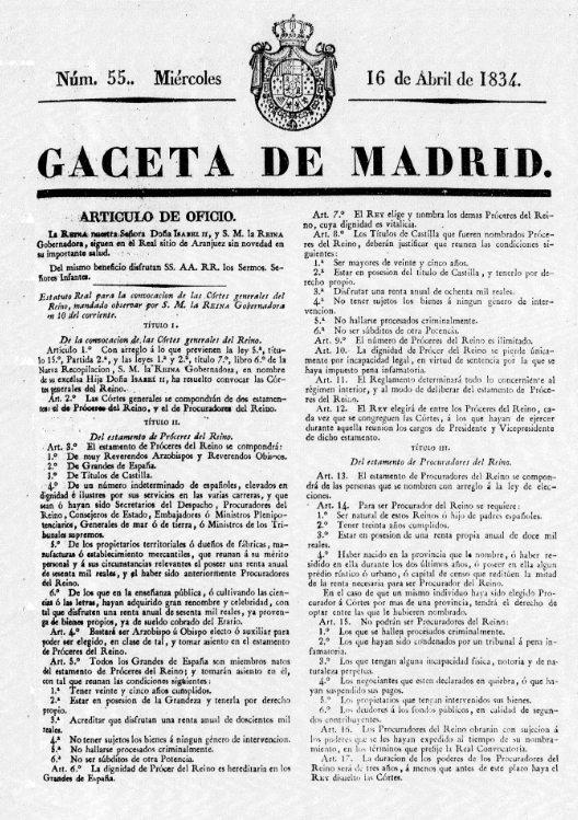 Publicación do Estatuto real de 1834 na Gaceta de Madrid